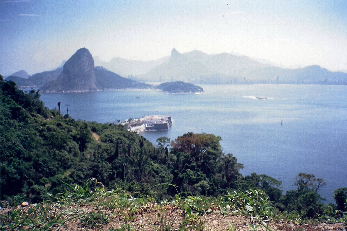 Baía de Guanabara, RJ, Brasil: aspecto da barra com as fortificações que a defendiam: Santa Cruz (primeiro plano), Laje (plano intermédio), e São João (ao fundo).